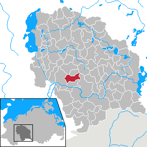 Domsühl in Mecklenburg-Vorpommern - District Parchim